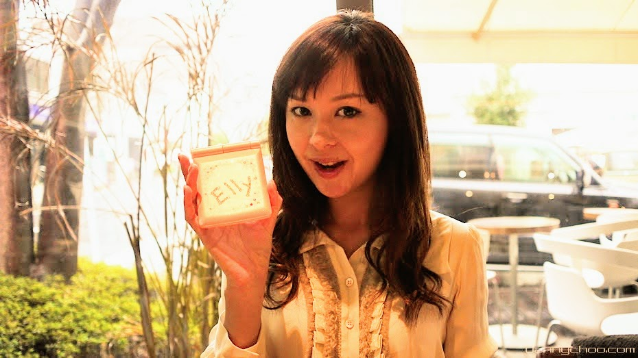 乙黑繪理。